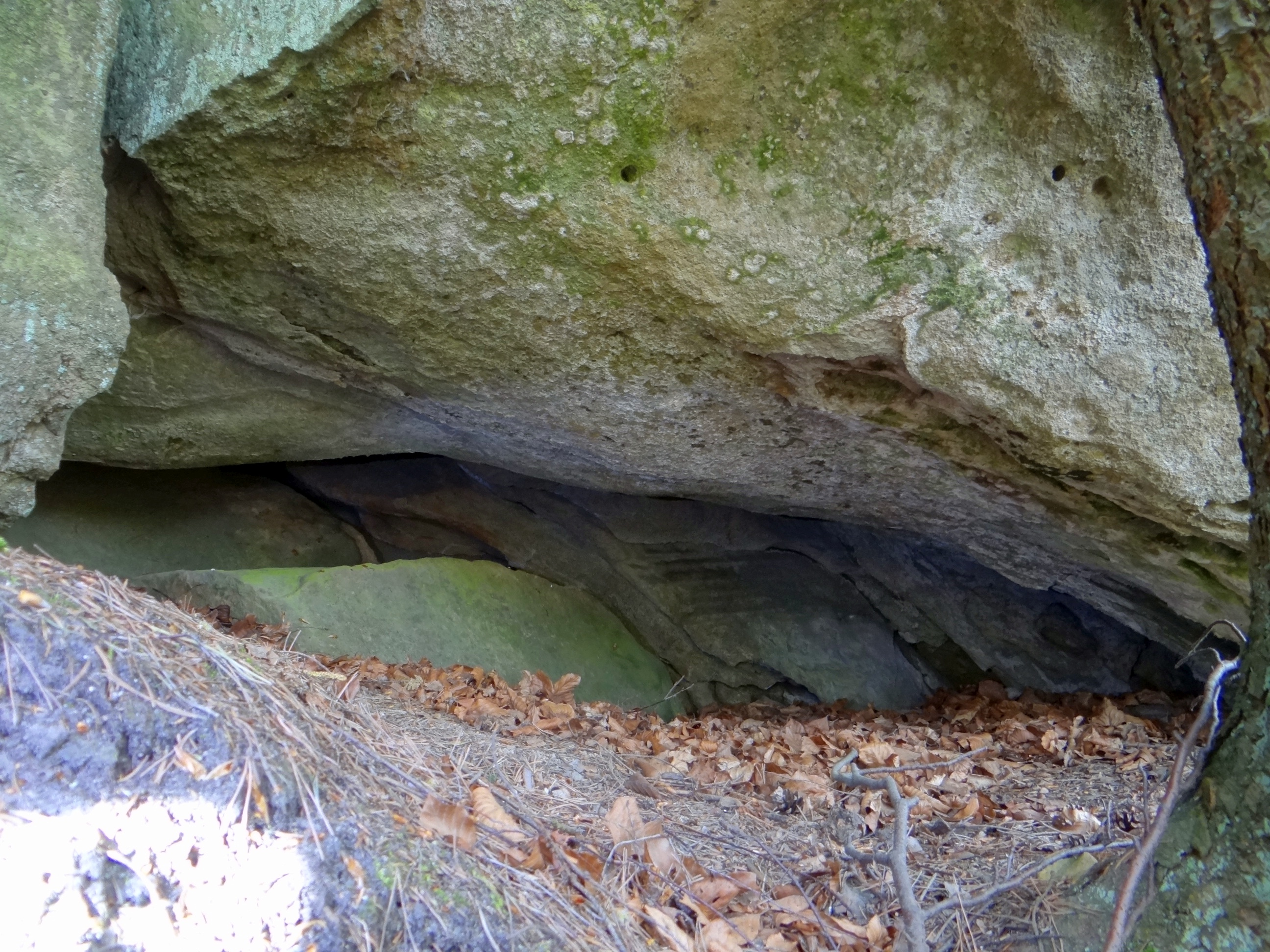 Schronisko Filipa